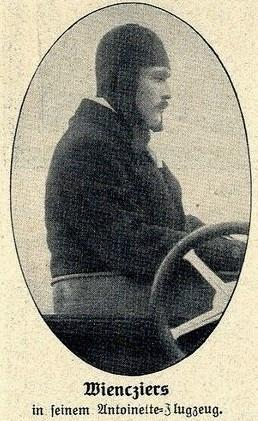 Aviatiker Eugen Wiencziers in seinem Antoinette-Flugzeug, Nationale Flugwoche in Johannisthal, August 1910